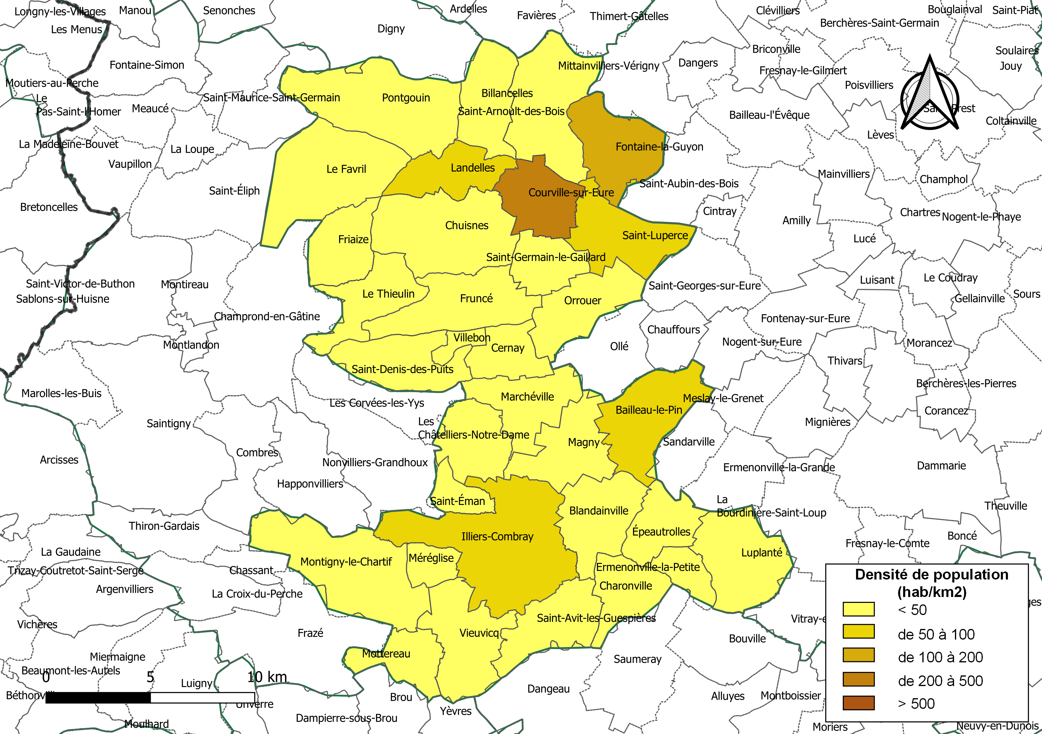 Carte des densités de population (millésimée 2016) des communes de la communauté de communes la Communauté de communes entre Beauce et Perche, département d'Eure-et-Loir, France. Composition au 1er janvier 2019.